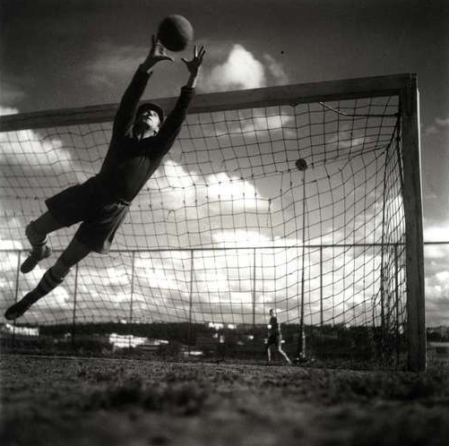 Sven Bergqvist, legendarisk fotbollsmålvakt.